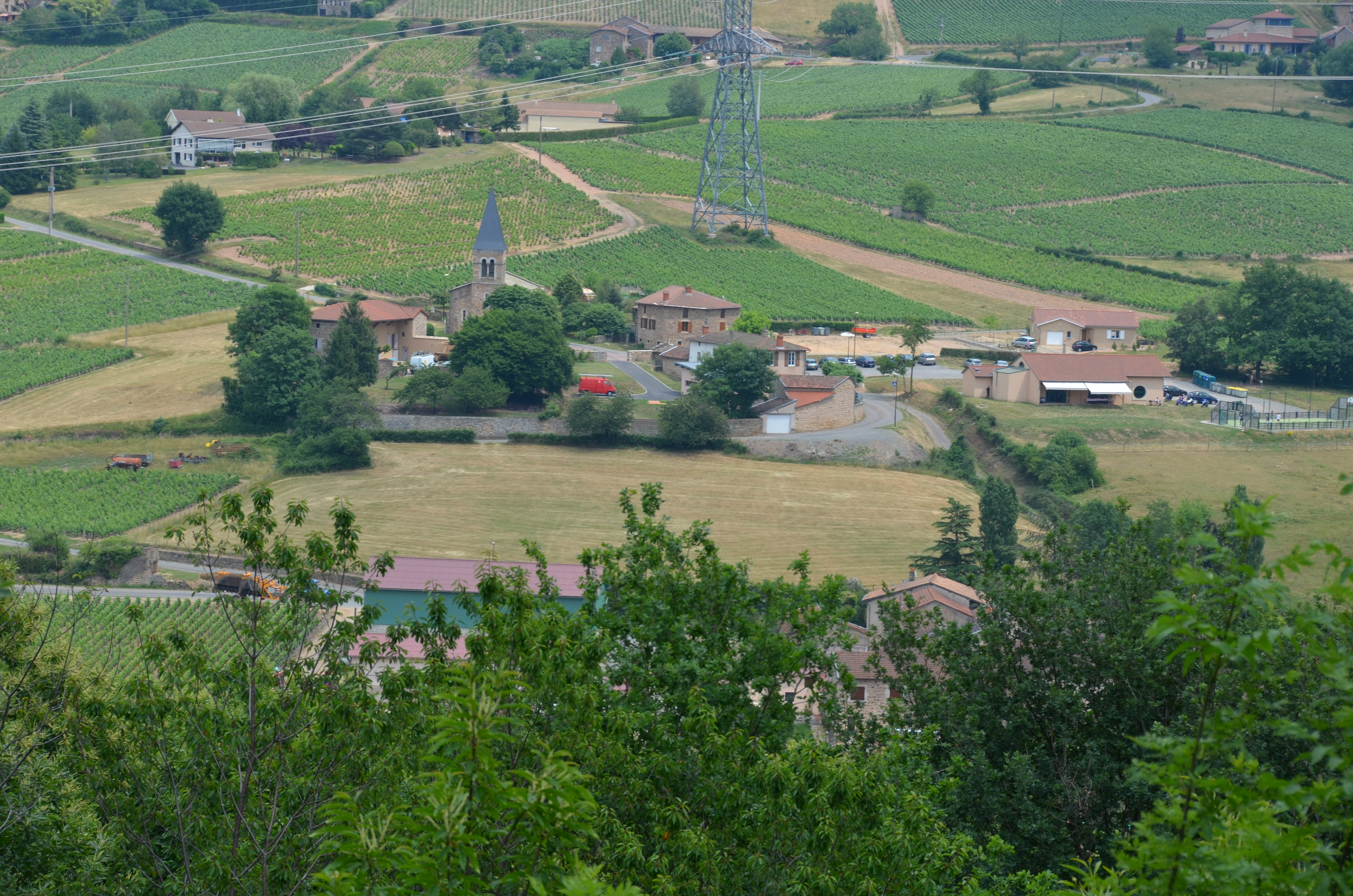 Vue du village de Serrières (Saône et Loire, France) depuis la Combe Berthaud